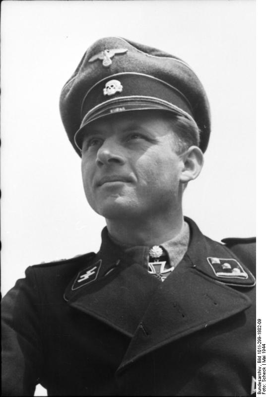 Scherl Bilderdienst: Kanalküste 15.5.44 Ein halbes Dutzend Tiger-Kommandanten. Sechs Kommandanten aus einer Kompanie der "SS-Panzer...Leibstandarte Adolf Hitler" vernicheten mit ihren Tigern nahezu 3 kampfstarke Panzerbrigaden. Der Kompaniechef - leuchtendes Vorbild. Obersturmführer Michael Wittmann steht mit seinen 117 Panzerabschüssen nicht nur an der Spitze seiner Kompanie, sonder ist einer der erfolgreichsten Panzerkommandanten überhaupt. Ausser ihm gingen noch weitere fünf Kommandanten aus seiner Kompanie hervor, die wegen besonderer Tapferkeit vor dem Feind mit dem Ritterkreuz ausgezeichnet wurden. Schon das allein spricht für den Geist, der in dieser Kompanie herrscht. Innerhalb von 14 Tagen wurde Obersturmführer Wittmann mit dem Ritterkreuz und dem Eichenlaub ausgezeichnet, vernichtete er doch in dieser Zeit weitere 28 russische Panzer, darunter grösstenteils T 34. Wenn man den Kompaniechef aus Vogelthal in der Oberpfalz, der mit seinen 30 Jahren kaum älter ist als die meisten seiner Kommandanten, im Gespräch mit seinen Männern beobachtet, fühlt man unwillkürlich die aus vielen Kämpfen geborene Kameradschaft heraus, die nötig ist, um aus Einzelkämpfern ein erfolgreiches Ganzes zu schaffen. Prop- Kp. 698, Bildberichter Scheck